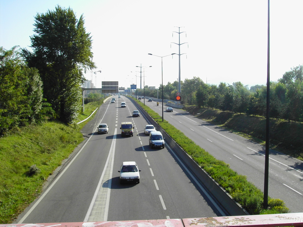 rocade Ouest (A480) le long de la rivière Drac à droite